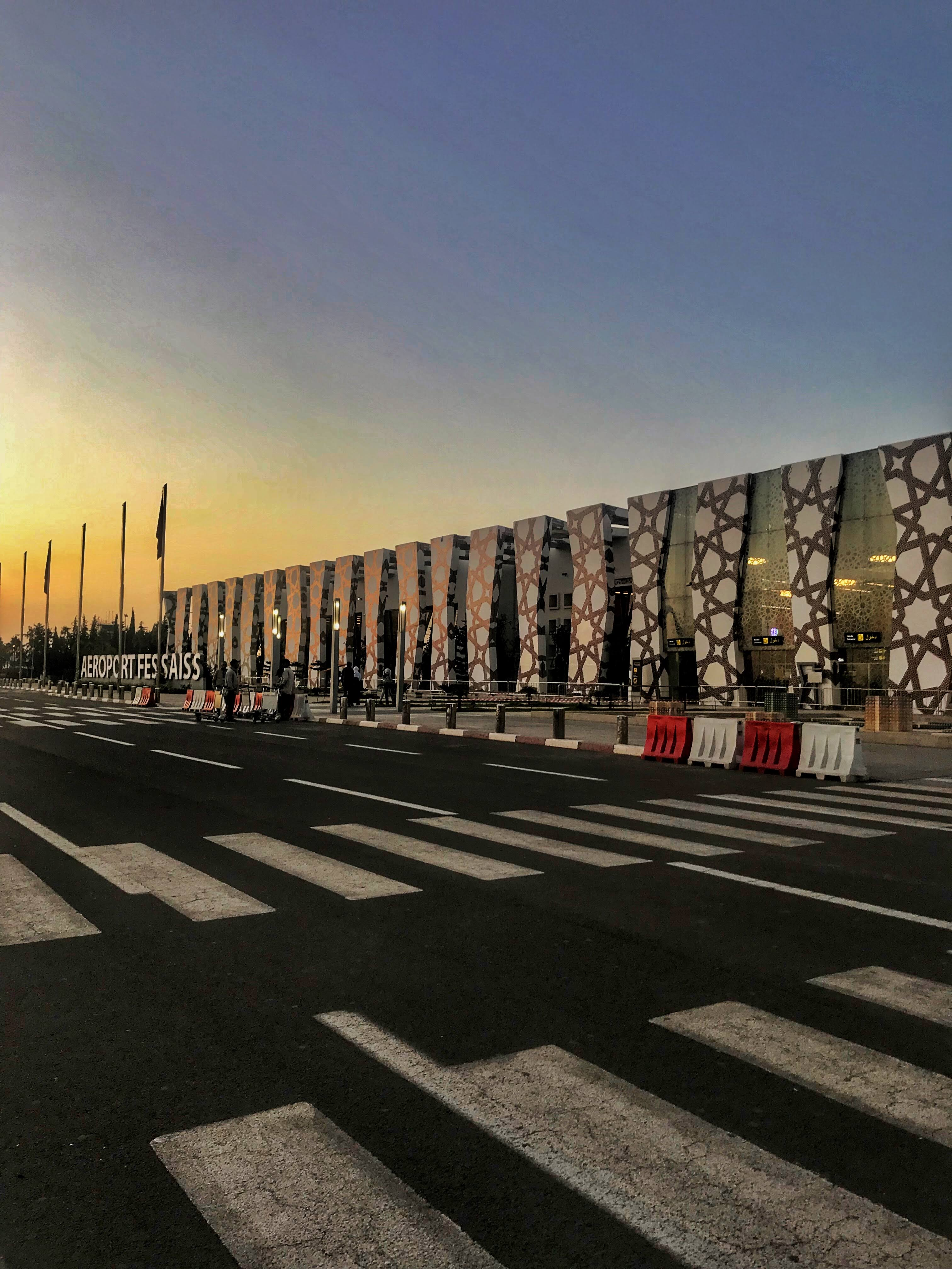 L’aéroport de Fes, tôt le matin. This is an image with the theme "Africa on the Move or Transport" from: Morocco